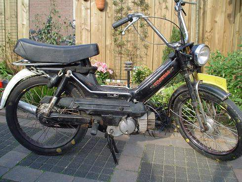 Puch Maxi, een bromfiets.